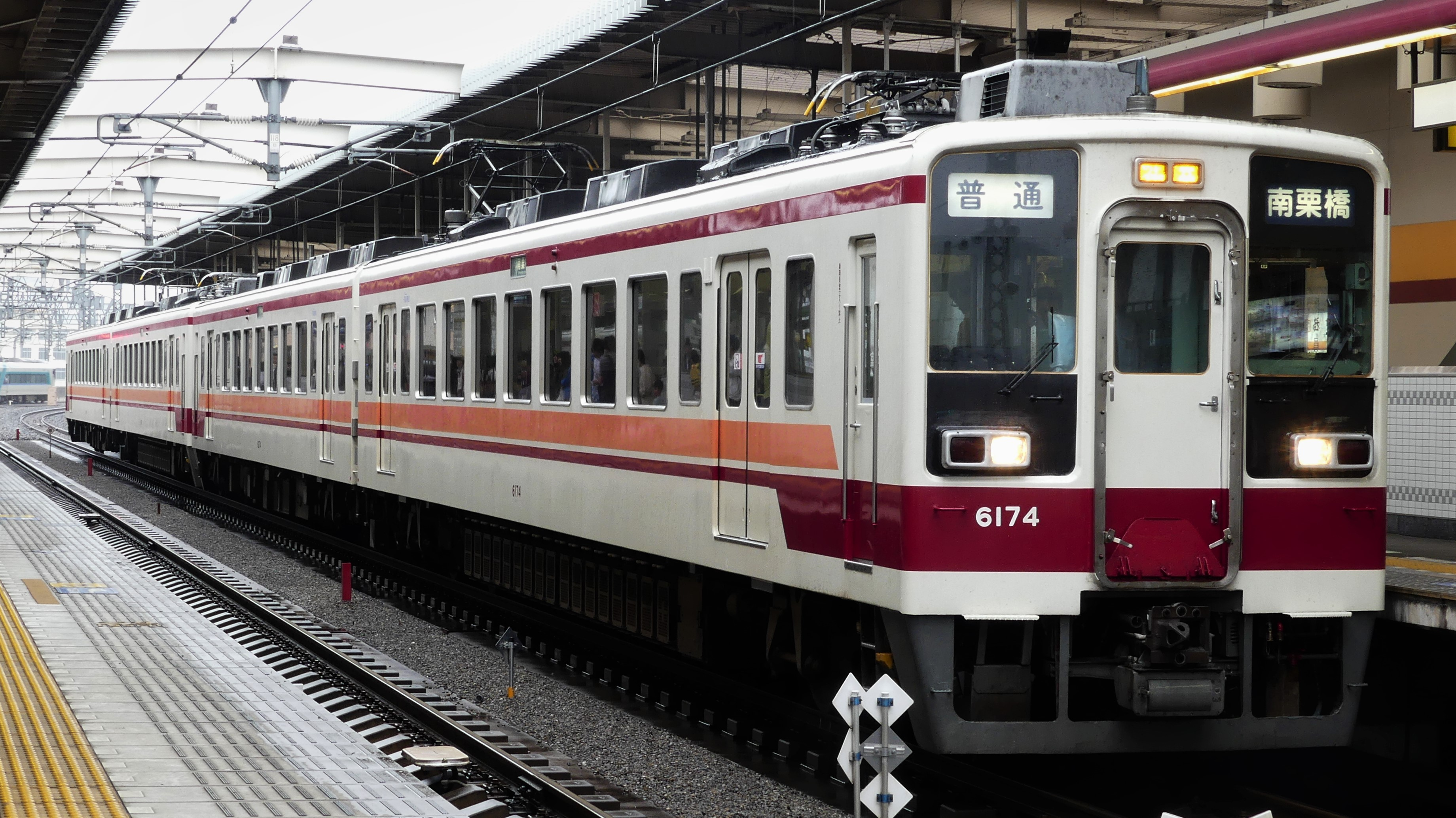 東武6050型(栃木駅撮影)